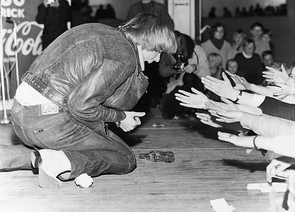 Laulaja Danny esiintymässä Syndikaatti tekee suurratsian -show'ssa maaliskuussa 1968.